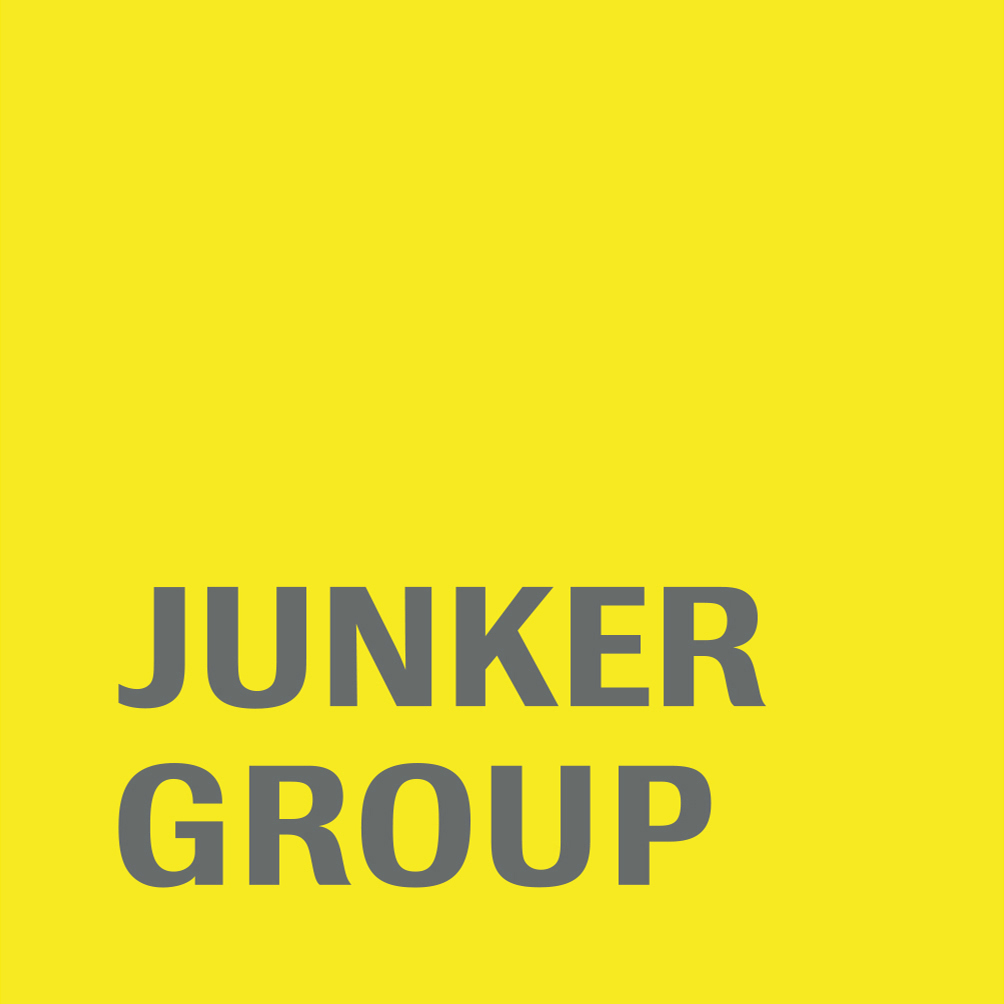 Maschinenbau